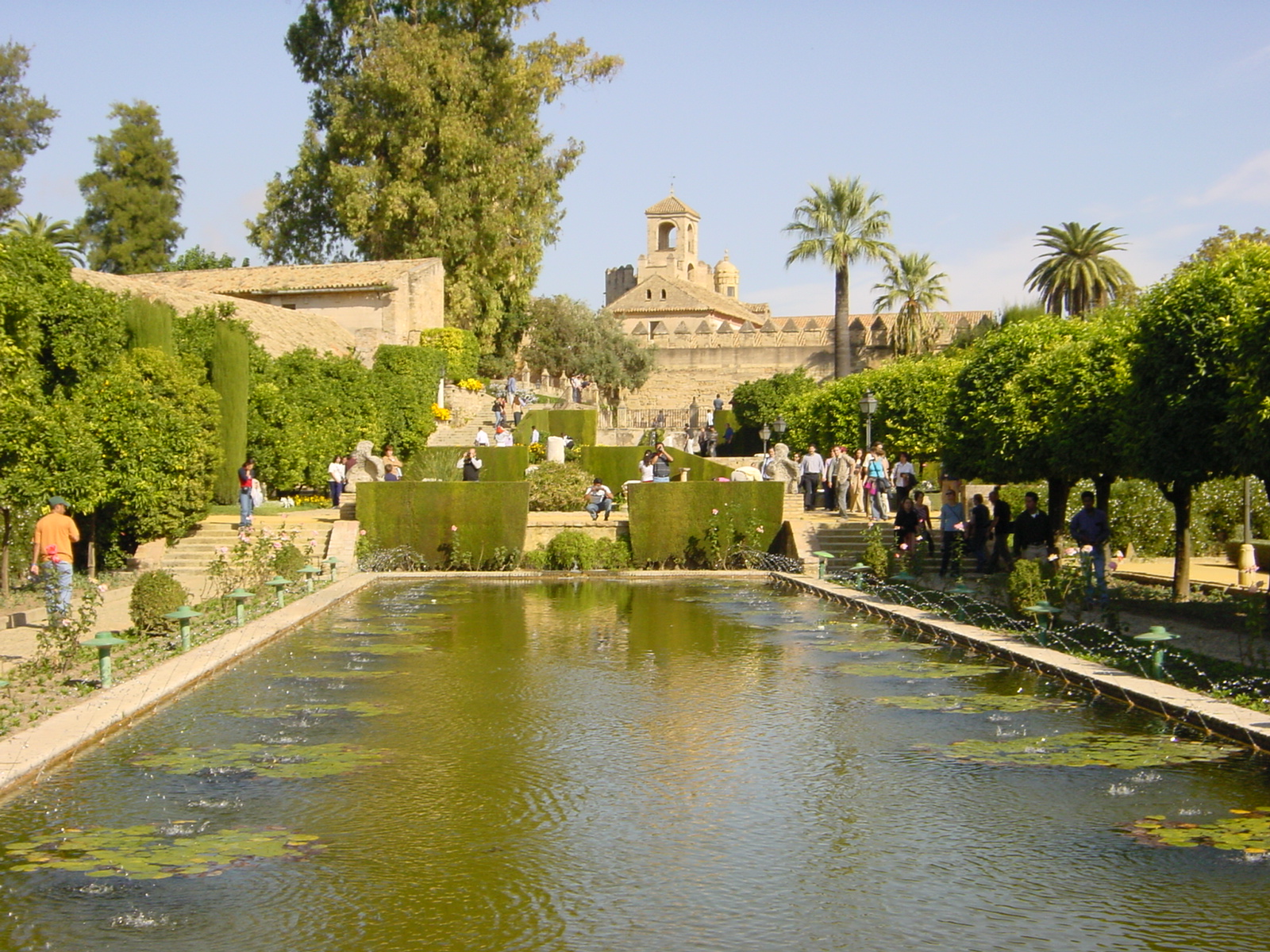 Alcázar de Córdoba, Andalucía